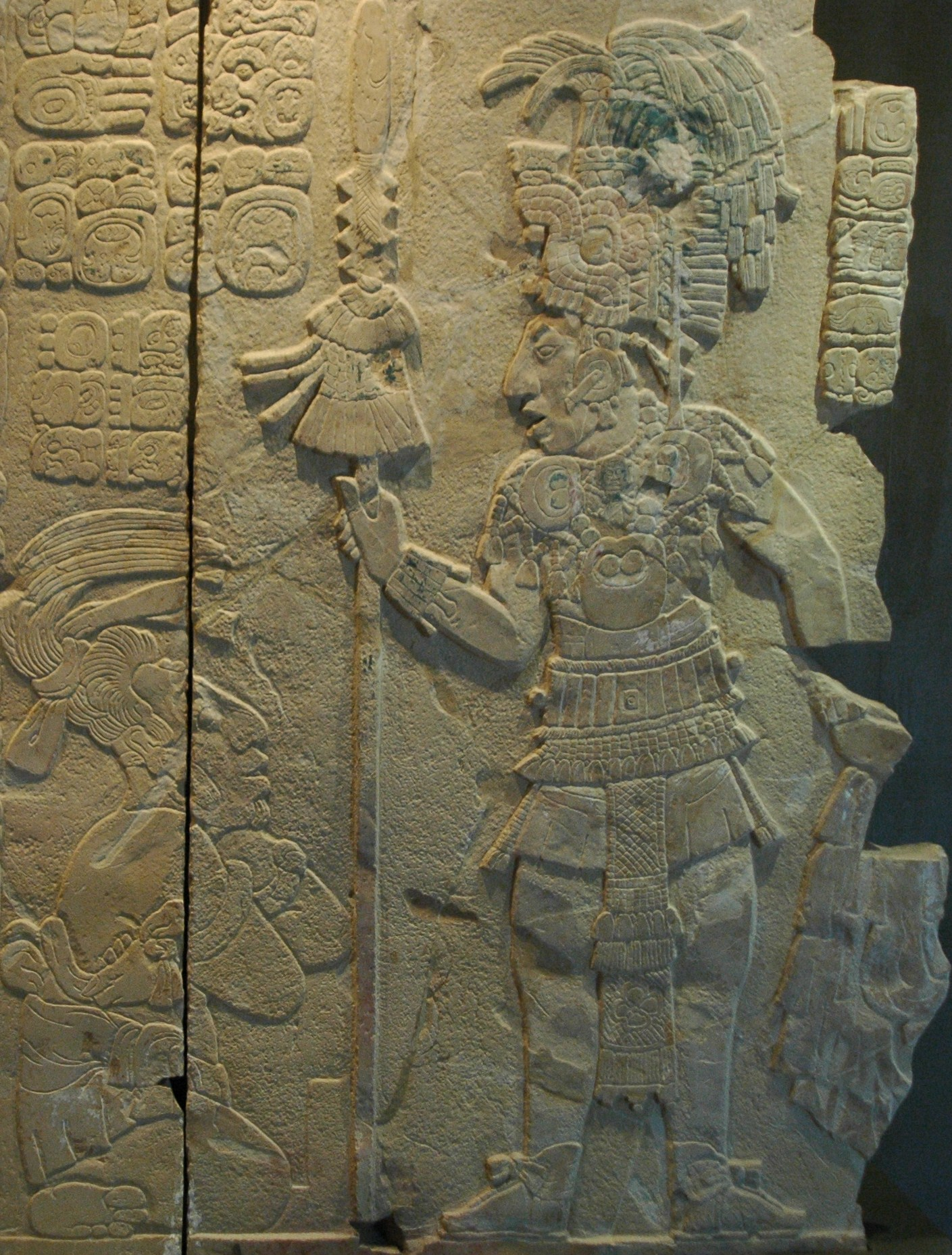 Tablero del Templo XVII de Palenque en donde se muestra a K'inich Kan Balam II con un prisionero de guerra.